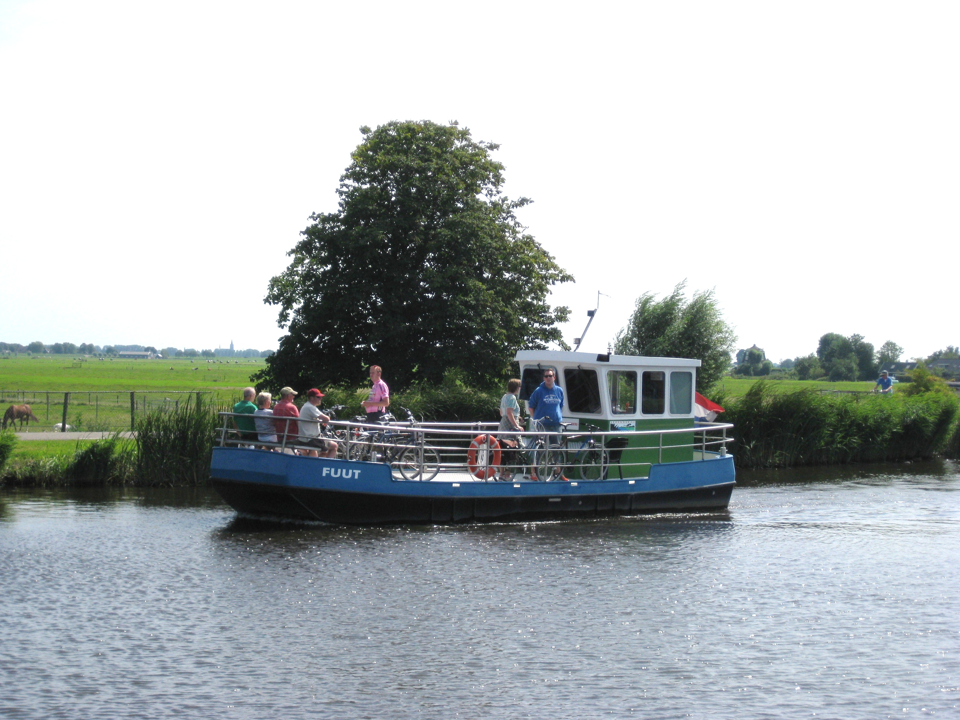 Fiets- en voetgangerspont "Fuut" over het Amstel-Drechtkanaal tussen Amstelveen en polder de Rondehoep.